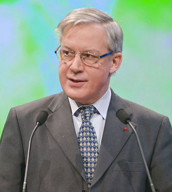 Christian Noyer au forum CB Richard Ellis 2008